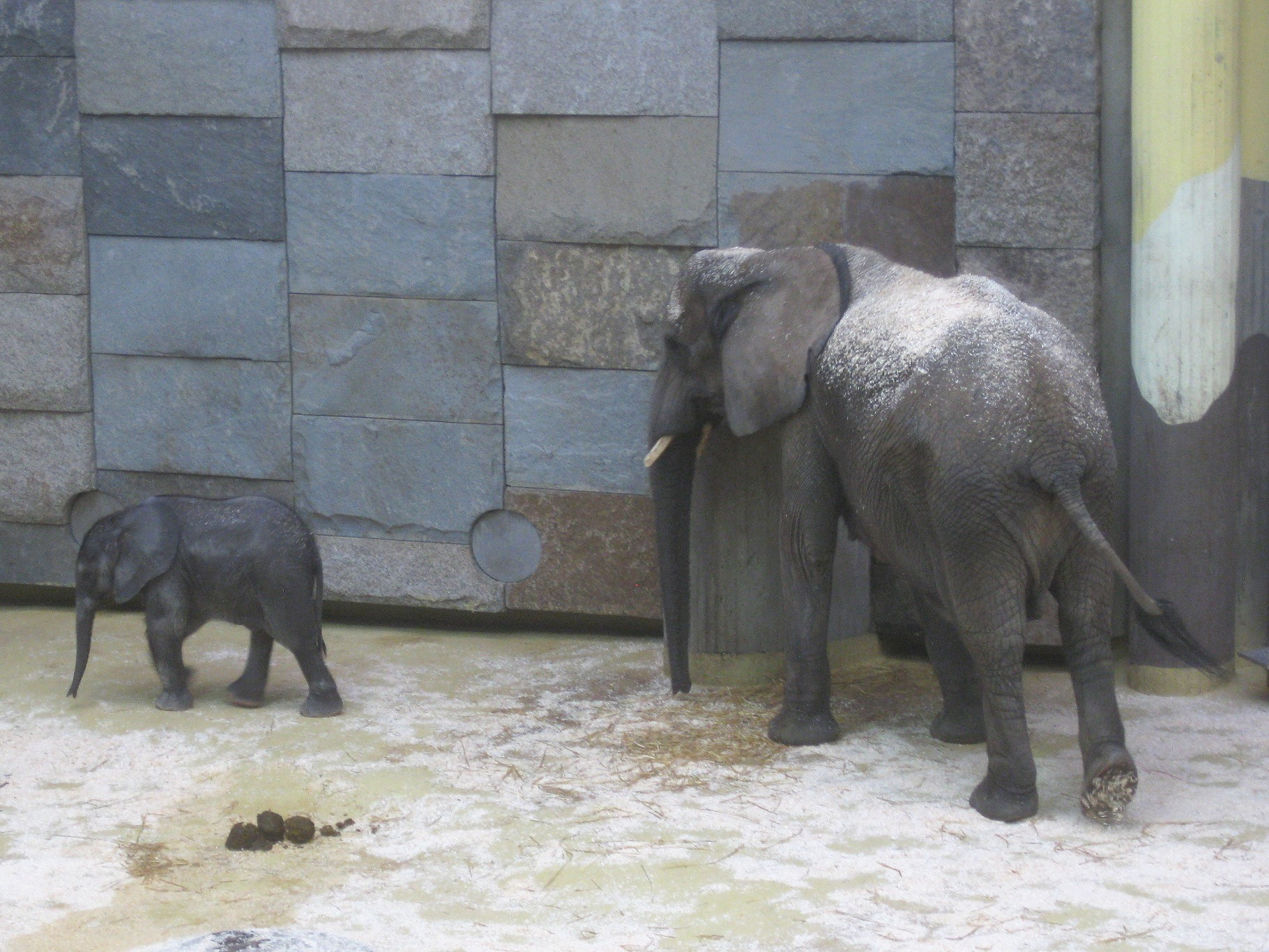 Afrikanische Elefanten (Jungtier Tuluba und Mutter Numbi) im Tiergarten Schönbrunn in Wien